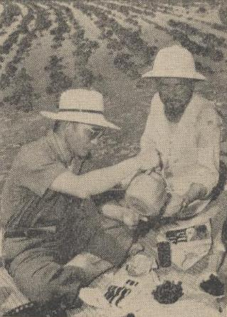 박정희 농촌 시찰